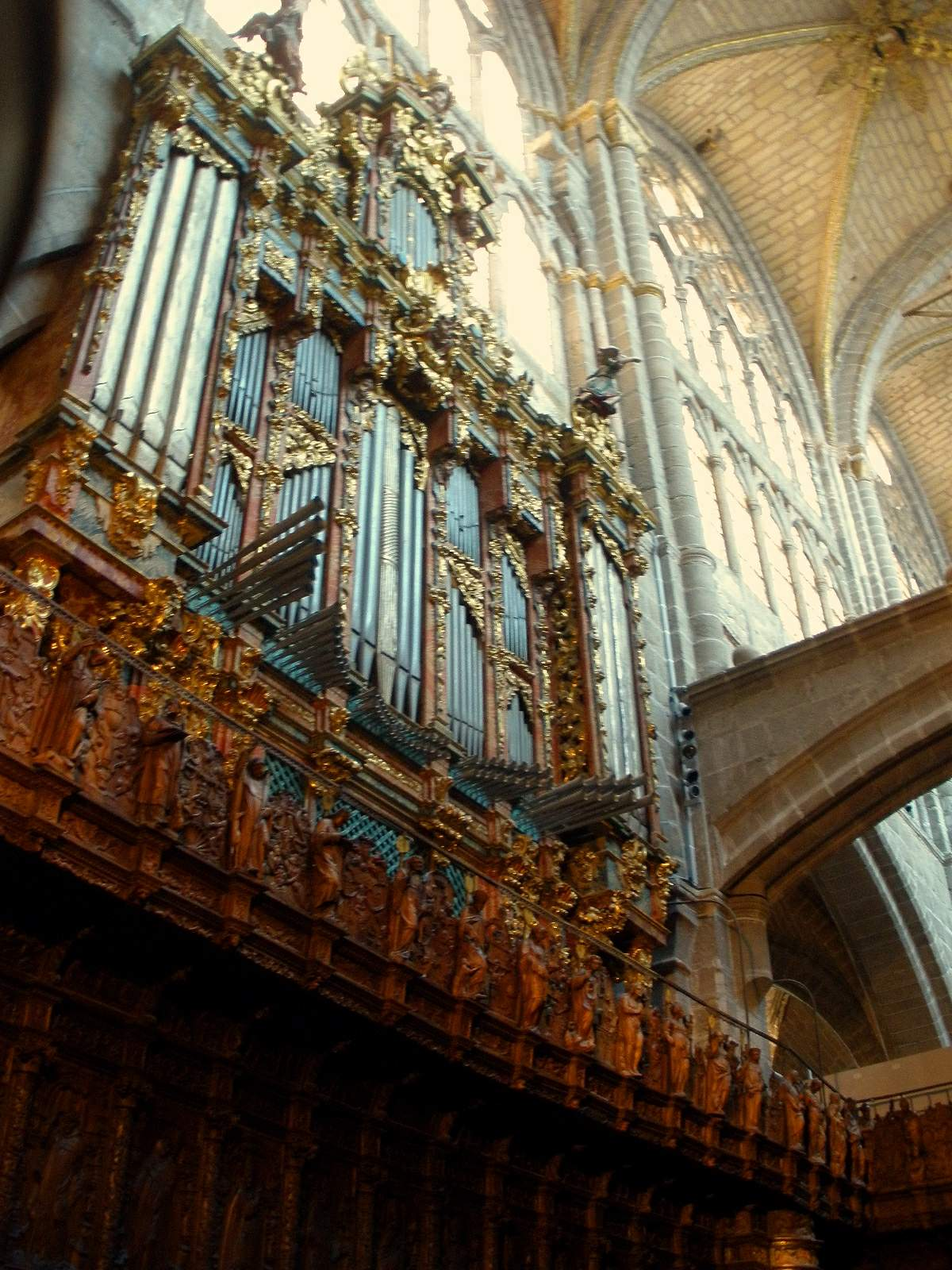 Catedral de Ávila. Órgano